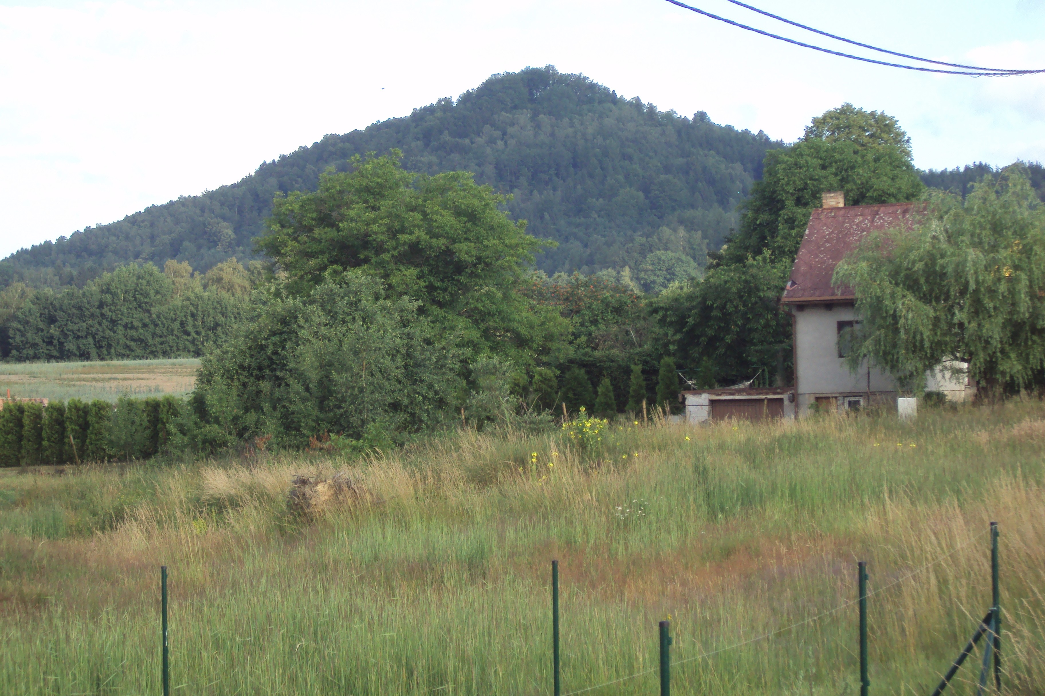 Skalický vrch je na jižním okraji obce Skalice, fotka z silničky z Pihelu na Skalici